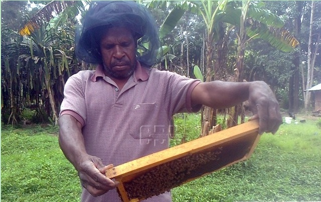 Salah satu peternak madu Wamena